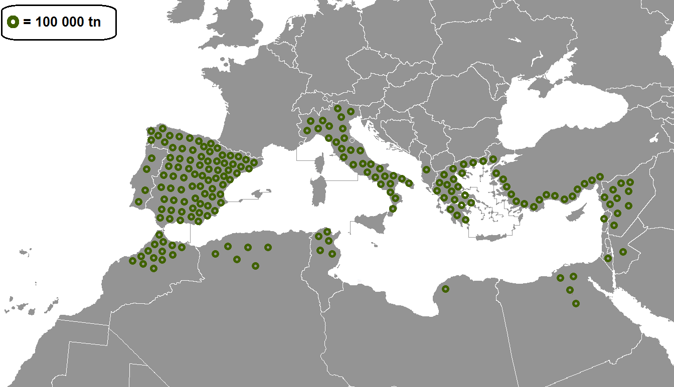 Producción de aceitunas por país en la cuenca del Mediterráneo. Cada círculo simboliza 100.000 tonelasds de producción de aceituna.